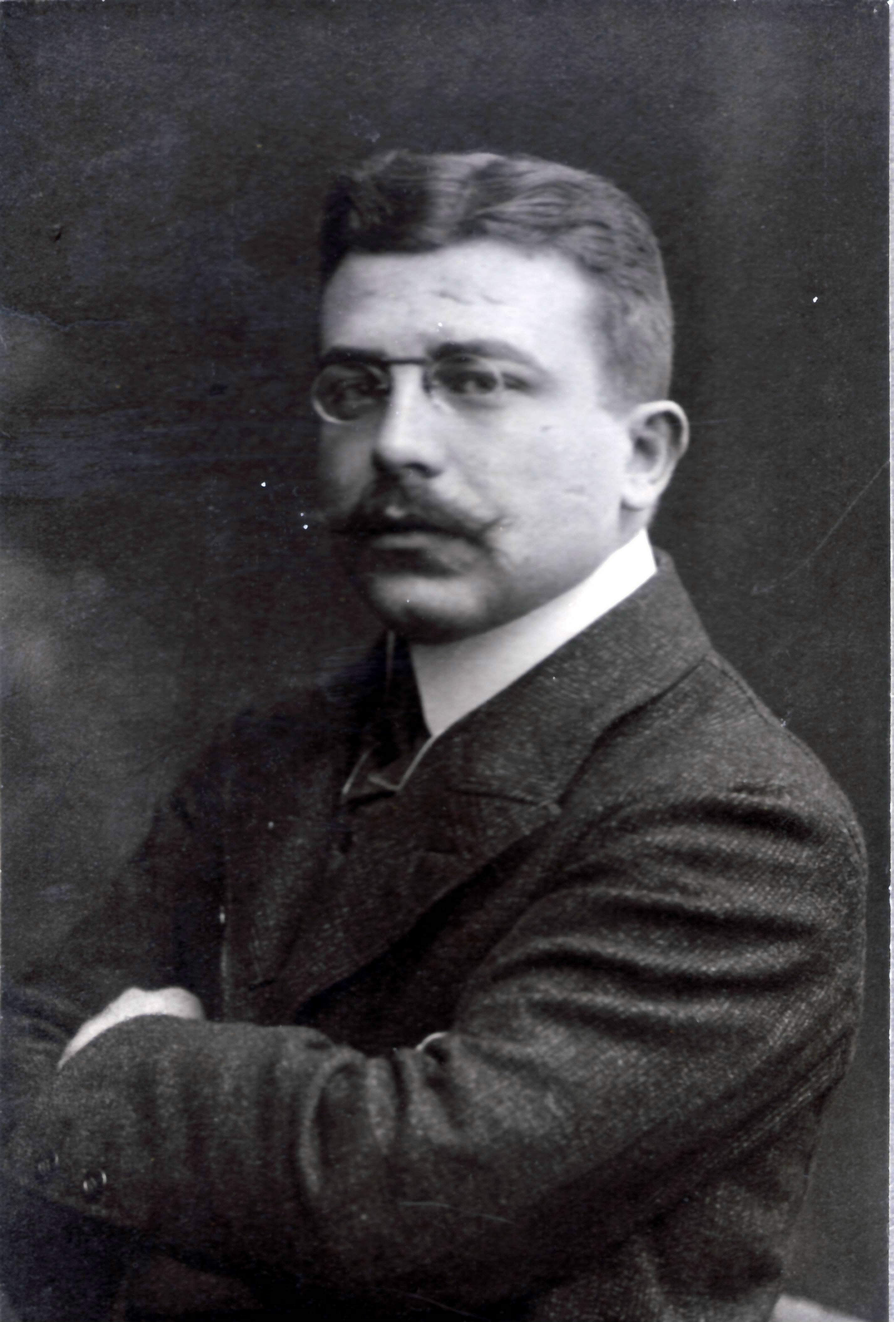 Fotografie des Richters und NS-Gegners Alfred Etscheit